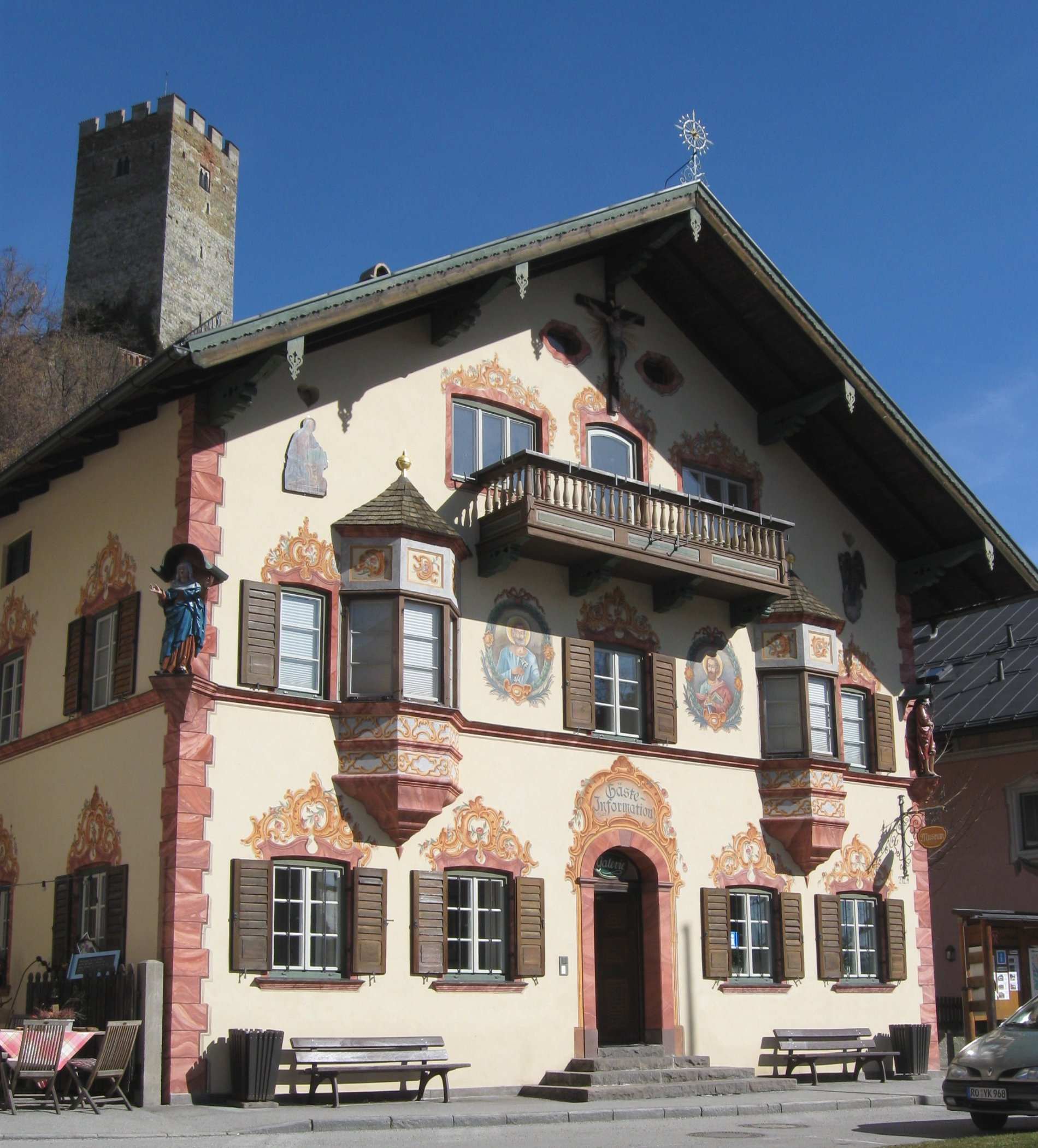 Neubeuern, Marktplatz 4; Wohnhaus, mit vorstehendem mittelsteilem Dach, zwei Eckerkern, Giebellaube und Bemalung der Fassade, Ende 19. Jh.